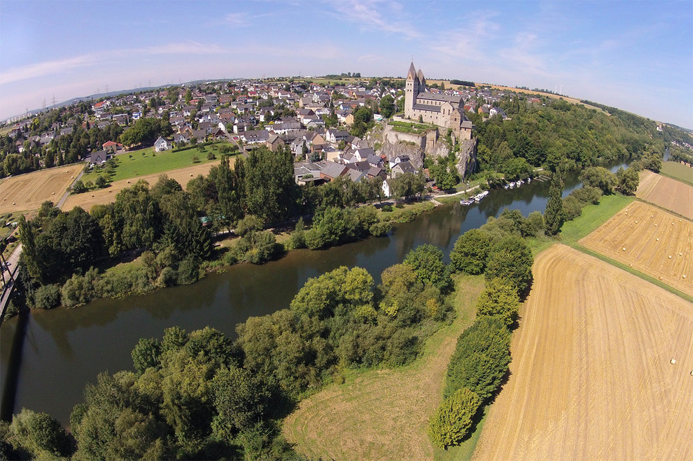 Dietkirchen, heute Ortsteil von Limburg, aus ca. 60 - 80m Höhe, mit der markanten, auf hoch aufragenden Kalkfelsen erbauten Lubentiusbasilika. Im Vordergrund die Lahn.